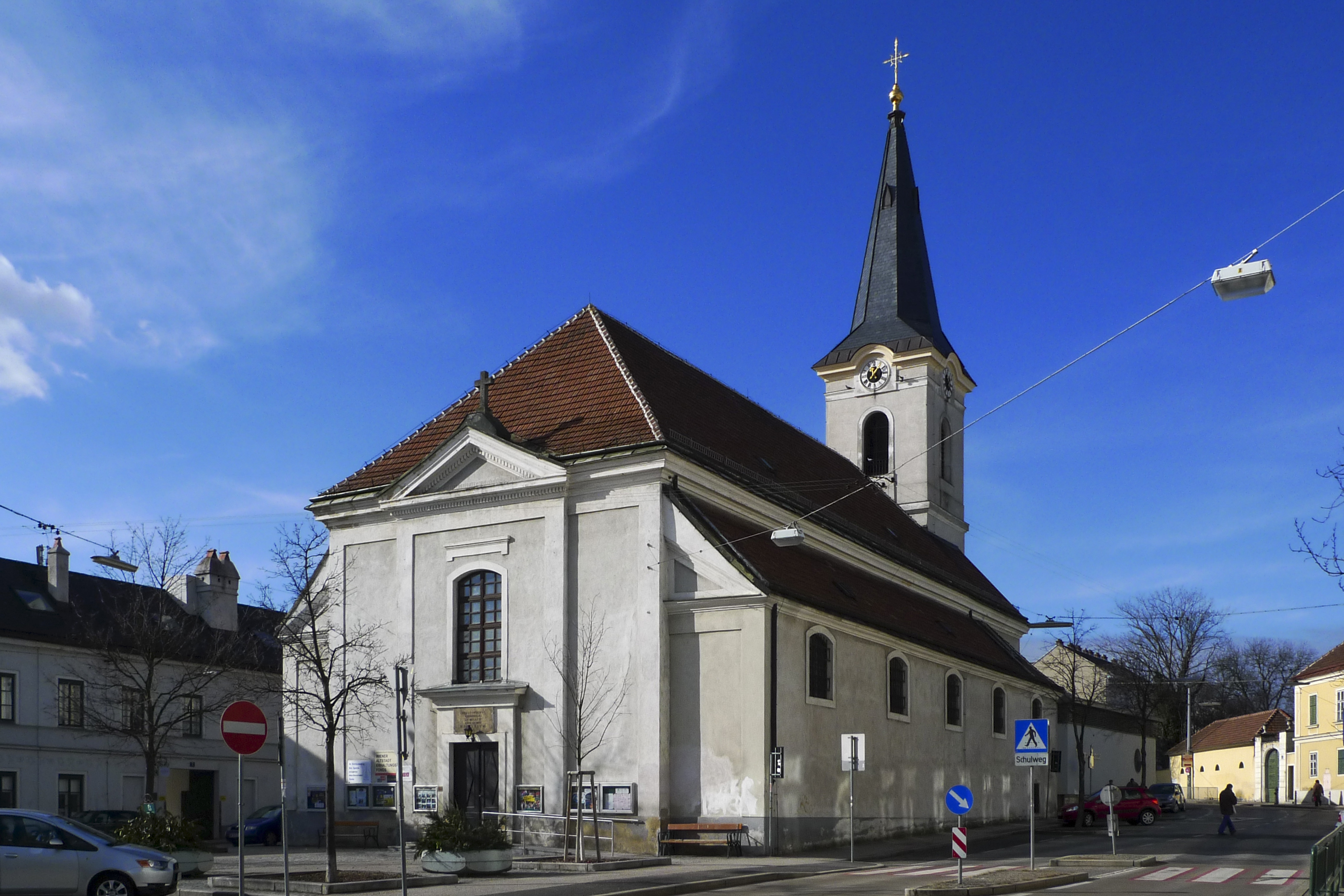 Atzgersdorfer Pfarrkirche hl. Katharina